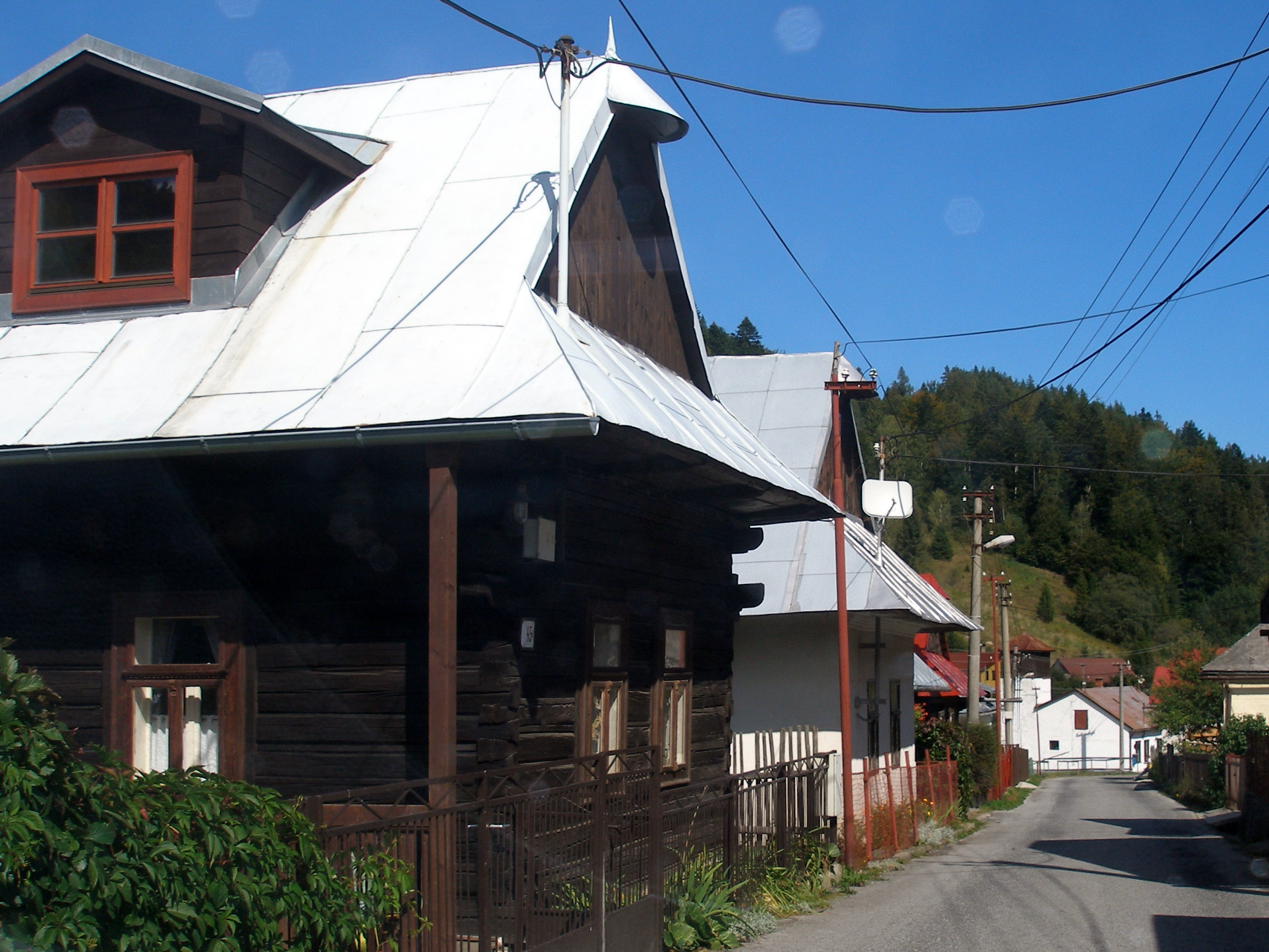 Spišská obec Henclová okres Gelnica.